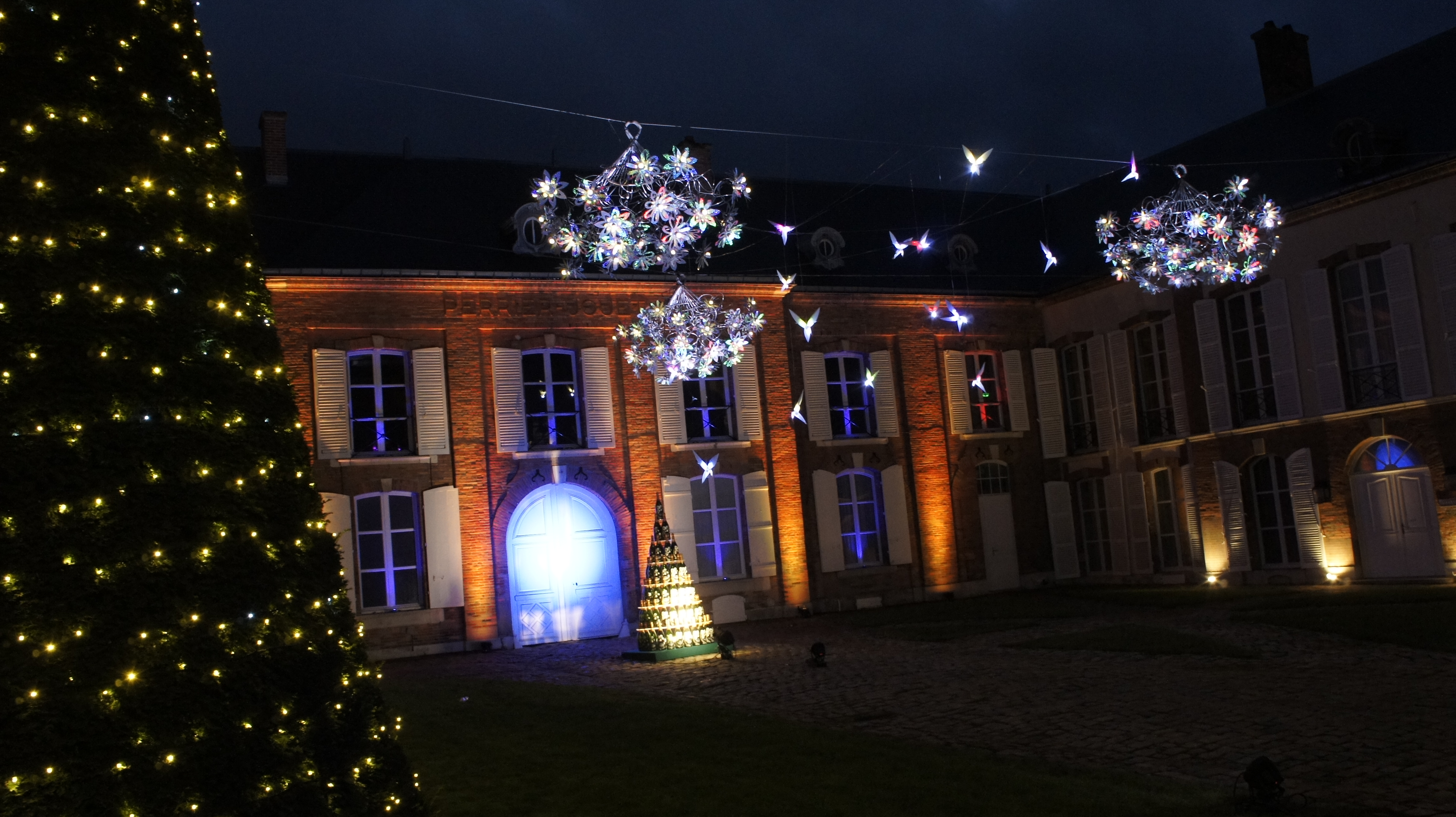 Evenement de 2012 sur l'illumination de la Marne . Avenue de Champagne à Epernay la maison Perrier-Jouet .